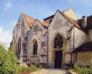 Eglise Saint-Martin à Savigny-Sur-Ardres